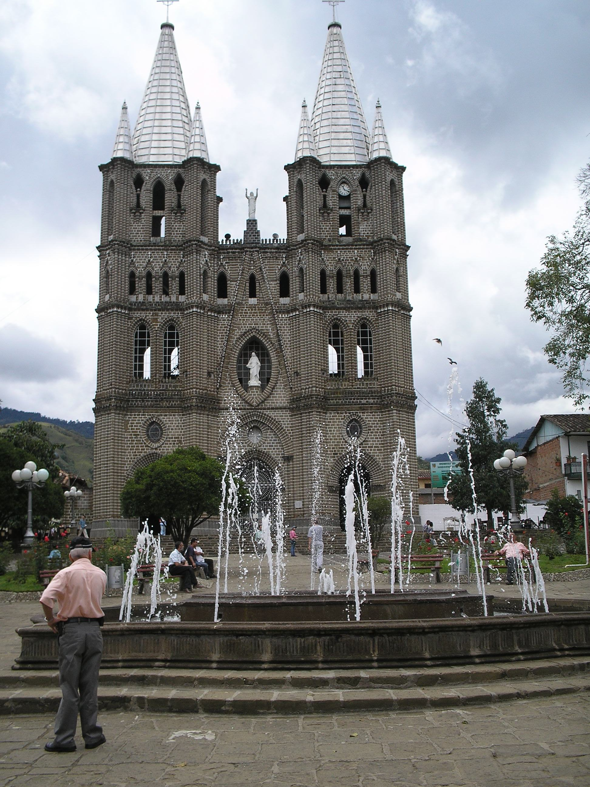 Iglesia en el parque principal de Jardín, Antioquia, Colombia